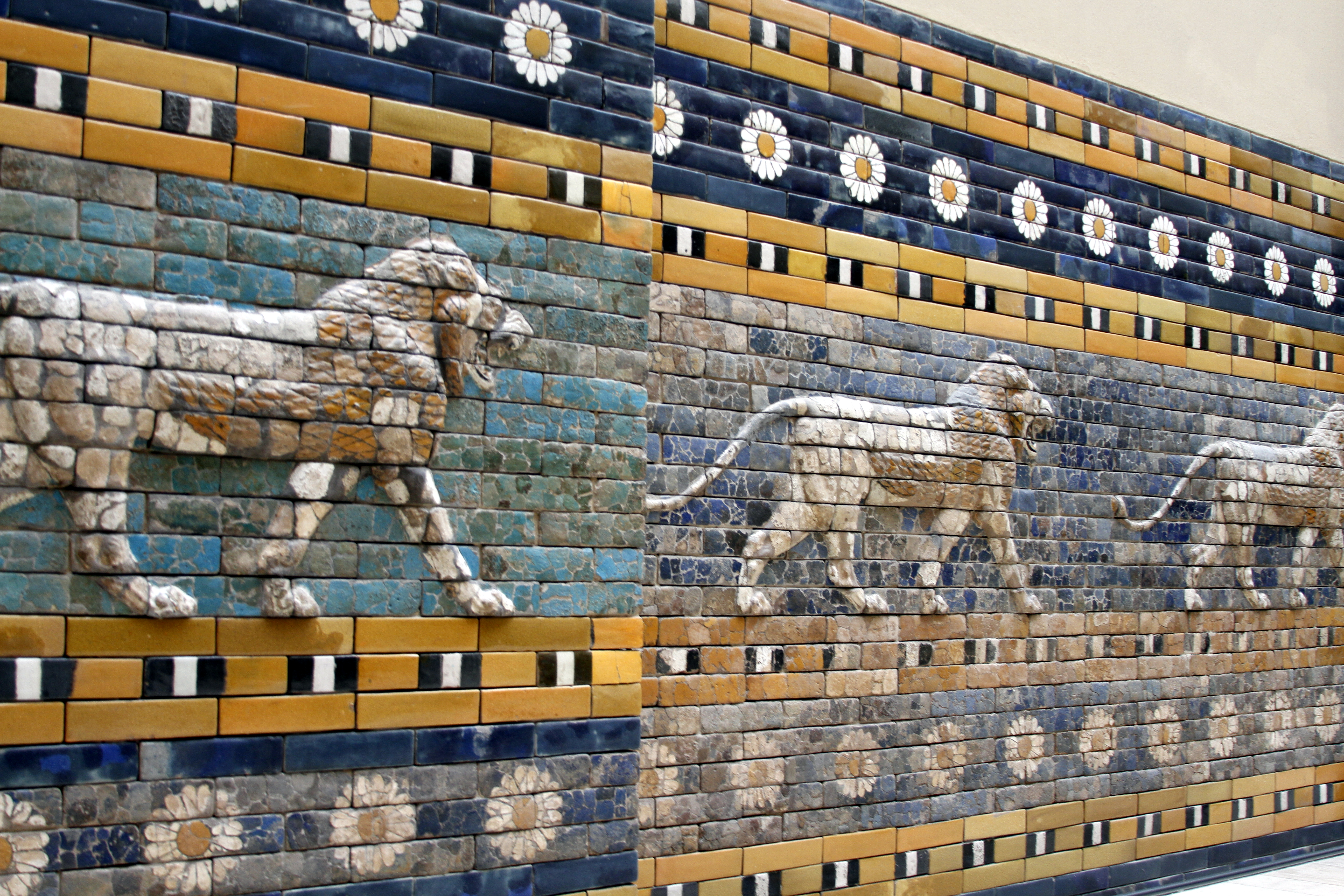 Processional Way of Babylon - Pergamonmuseum - Berlin - Germany